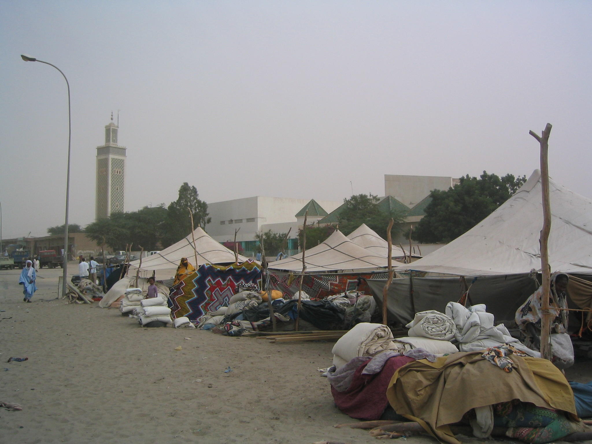 Mosquée "marocaine" et marché aux tentes à Nouakchott (Mauritanie)